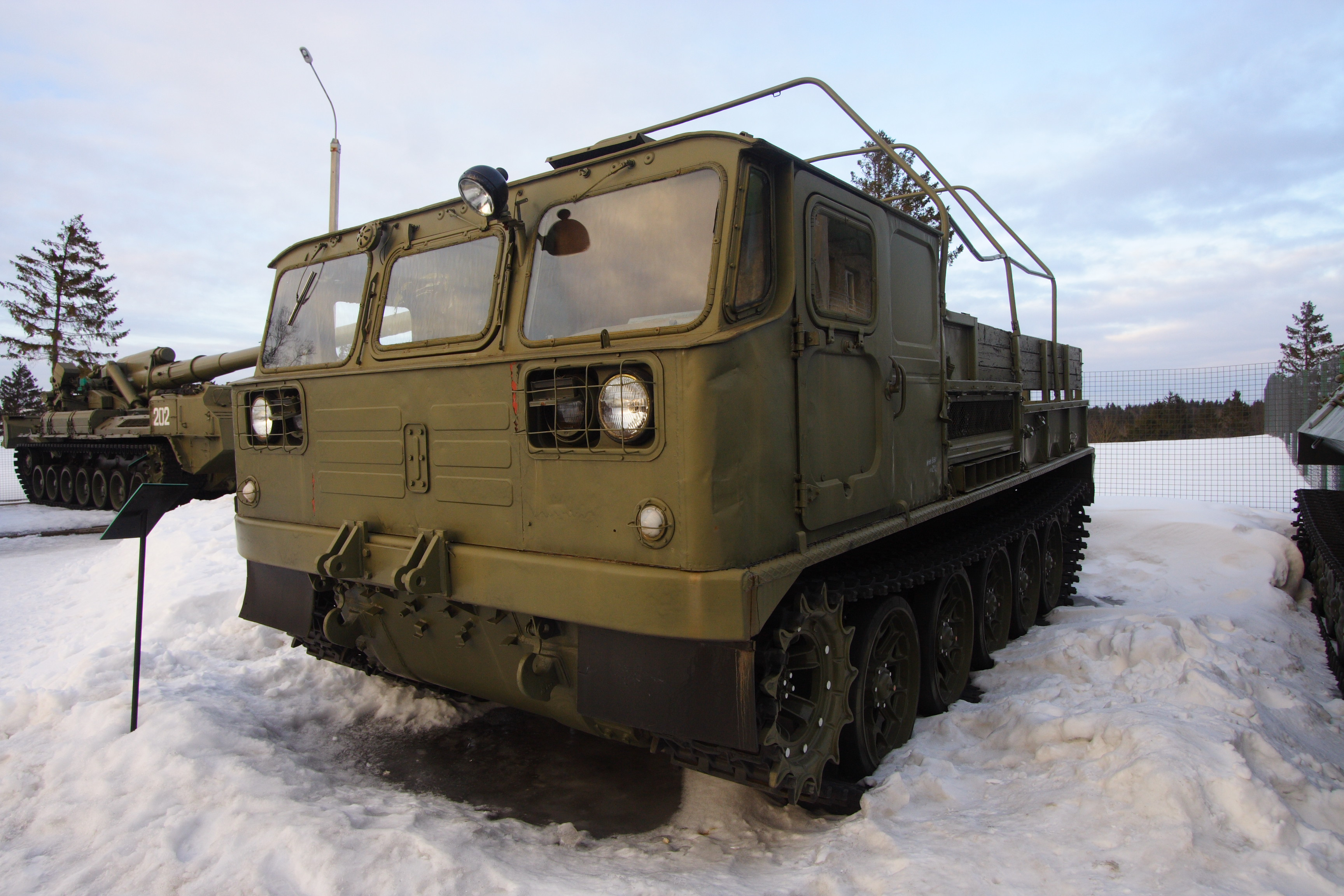 ATS-59